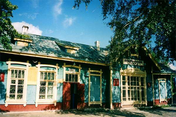 Вокзал ст. Подволошная (80-е годы)